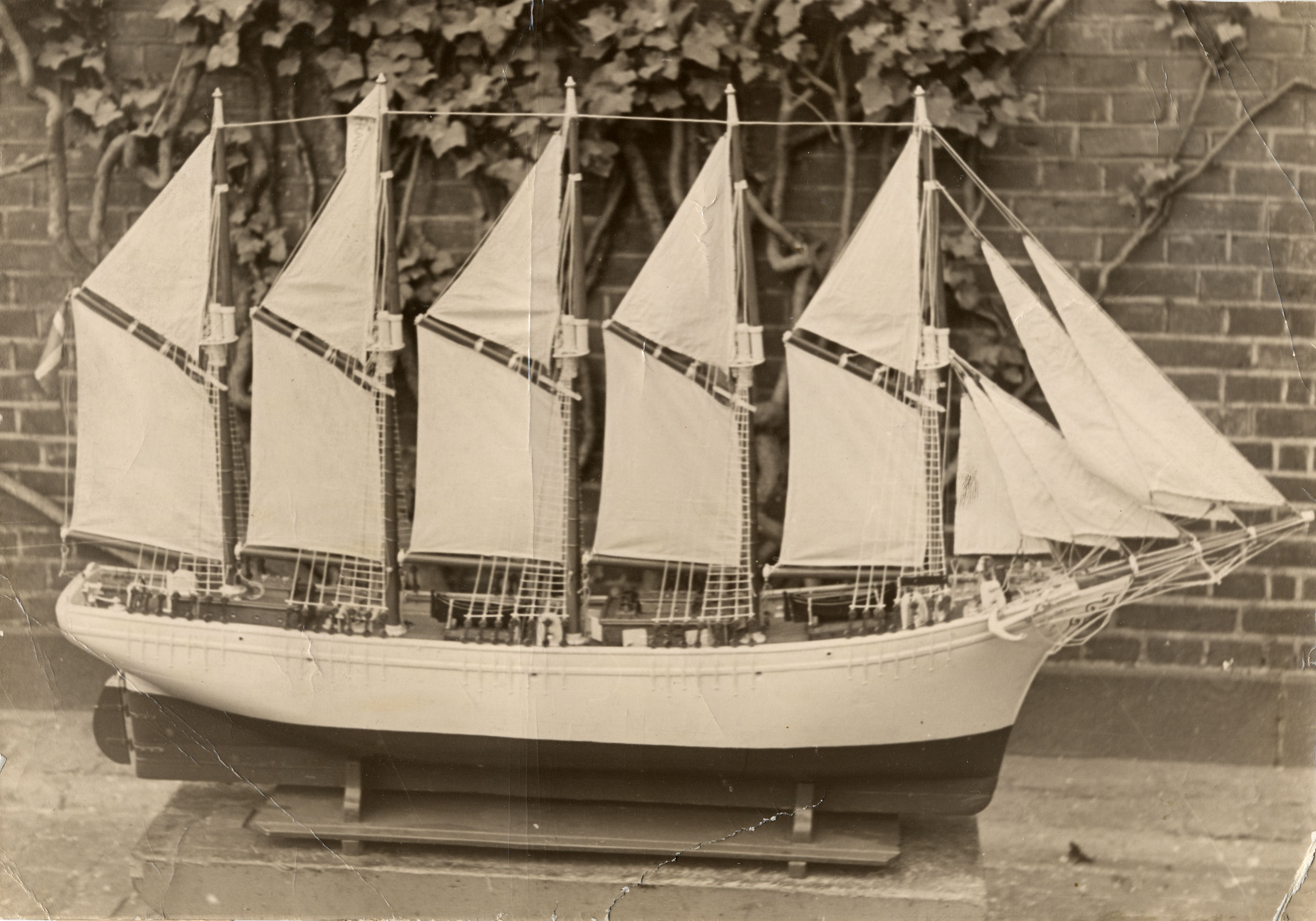 Modellen (fejlagtig file navn, da skibet ikke et skoleskibet 'København, men en fem master skonnert) er udført 1938 af Sømand Ola Andersson og foræret til Kofoeds Skole. Den var udstillet i B.T. Centralen og blev den 15.marts 1938 solgt for højeste bud. Hvem der købte og hvor skibet er nu (2009-10-01) vides desværre ikke. The factual accuracy of this description or the file name is disputed. Reason: Please see the relevant discussion on the talk page.